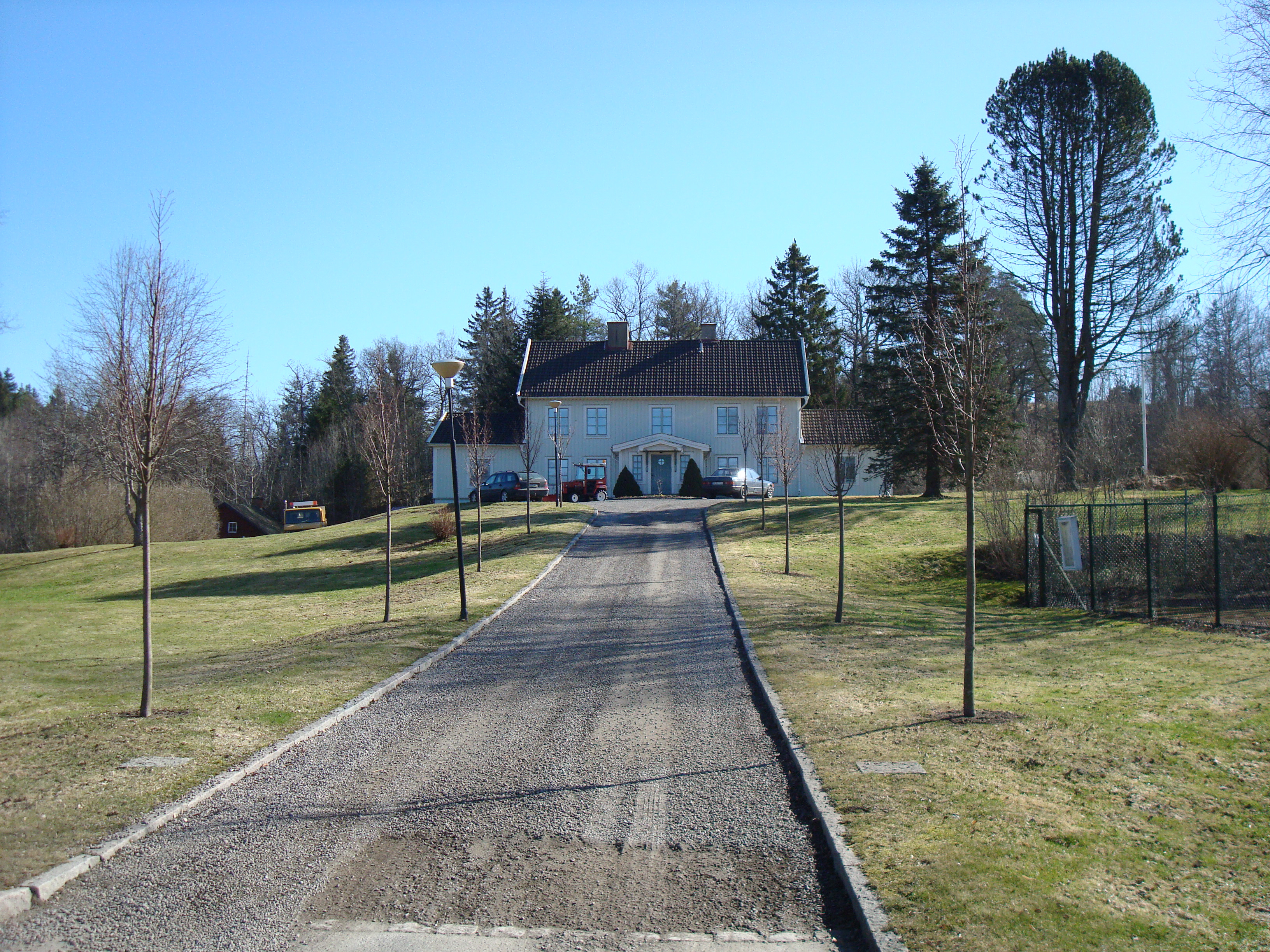 Prästgården i Hakarp